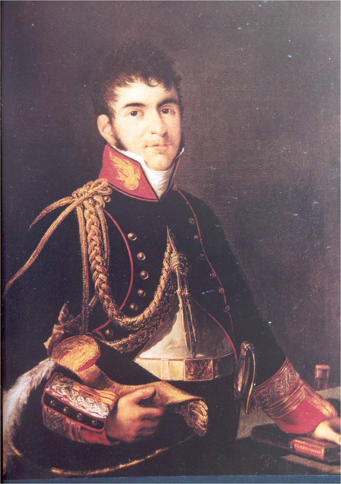 Retrato del aristócrata y military español Ildefonso Díez de Rivera (1777-1846), que fue el III conde de Almodóvar y llegó a ser Presidente del Estamento de Procuradores y presidente del Senado y también ministro de Guerra y de Estado durante el reinado de Isabel II de España.